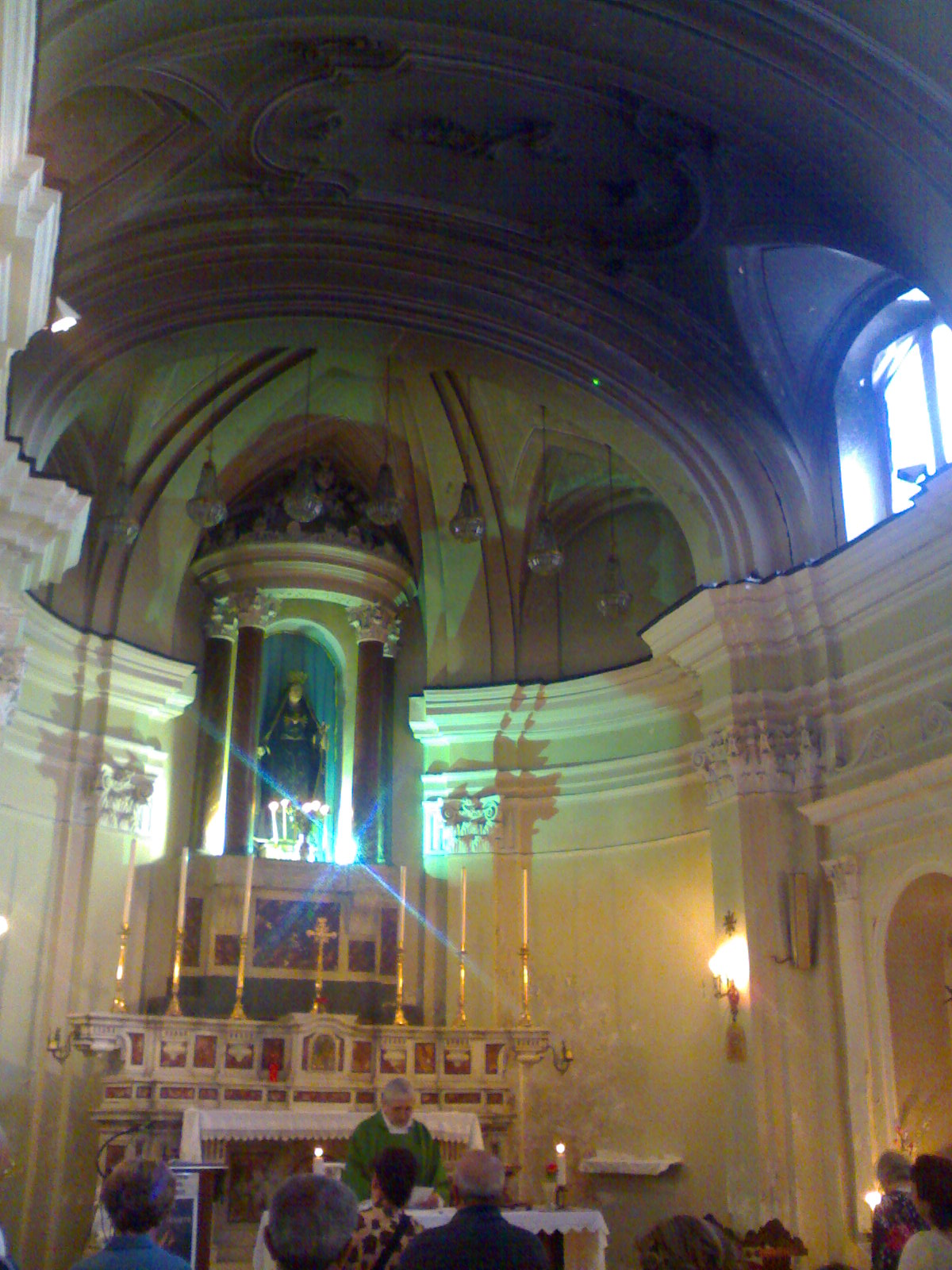 Chiesa di Santa Maria della Purità e Sant'Anna (Napoli, interno)